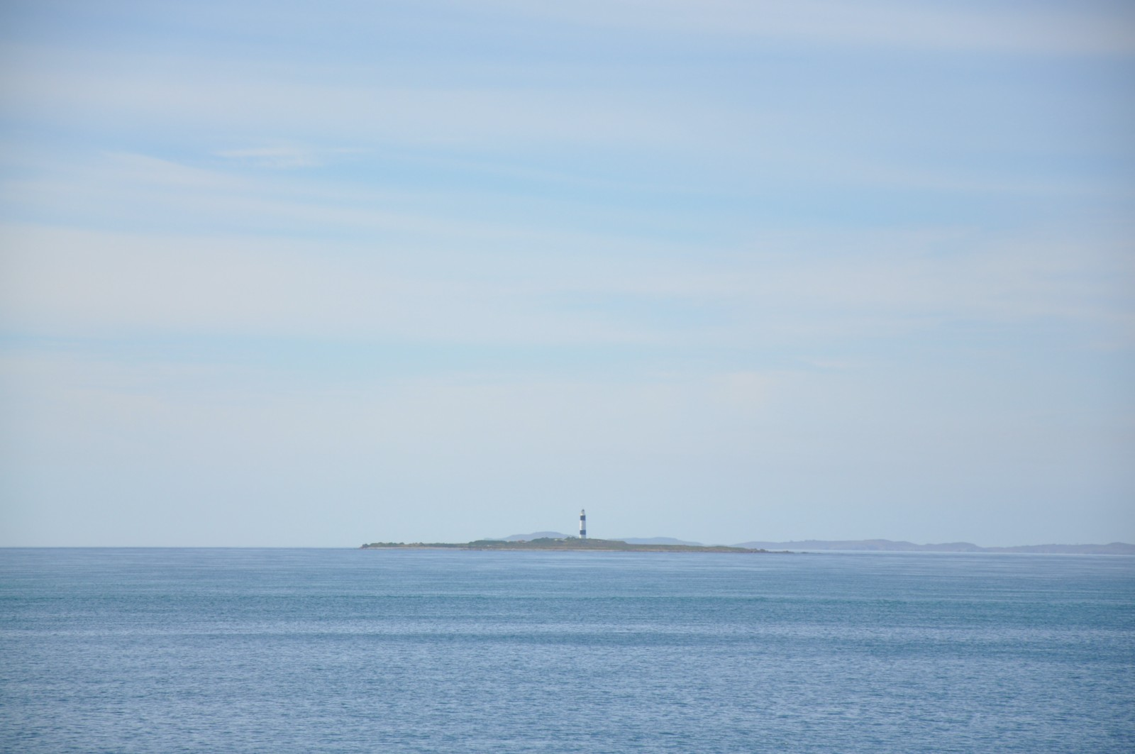 Dog Island avec son phare, visible du Stirling Point à Bluff